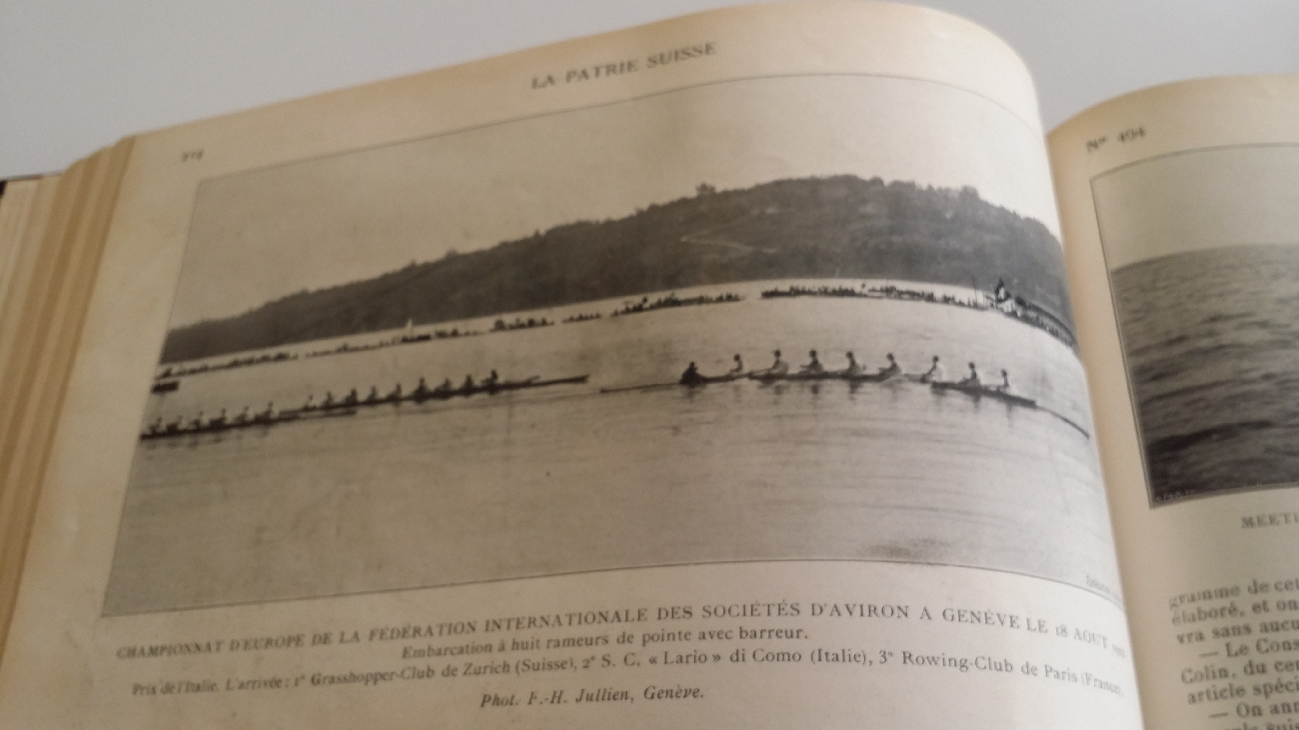 Photographie de Frank Henri Jullien publié dans La Patrie Suisse